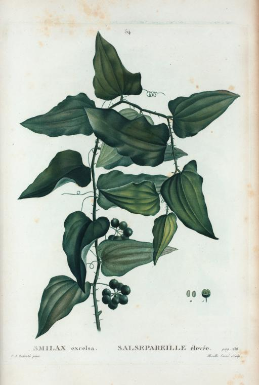 Smilax excelsa = Sakseoareukke élevée.